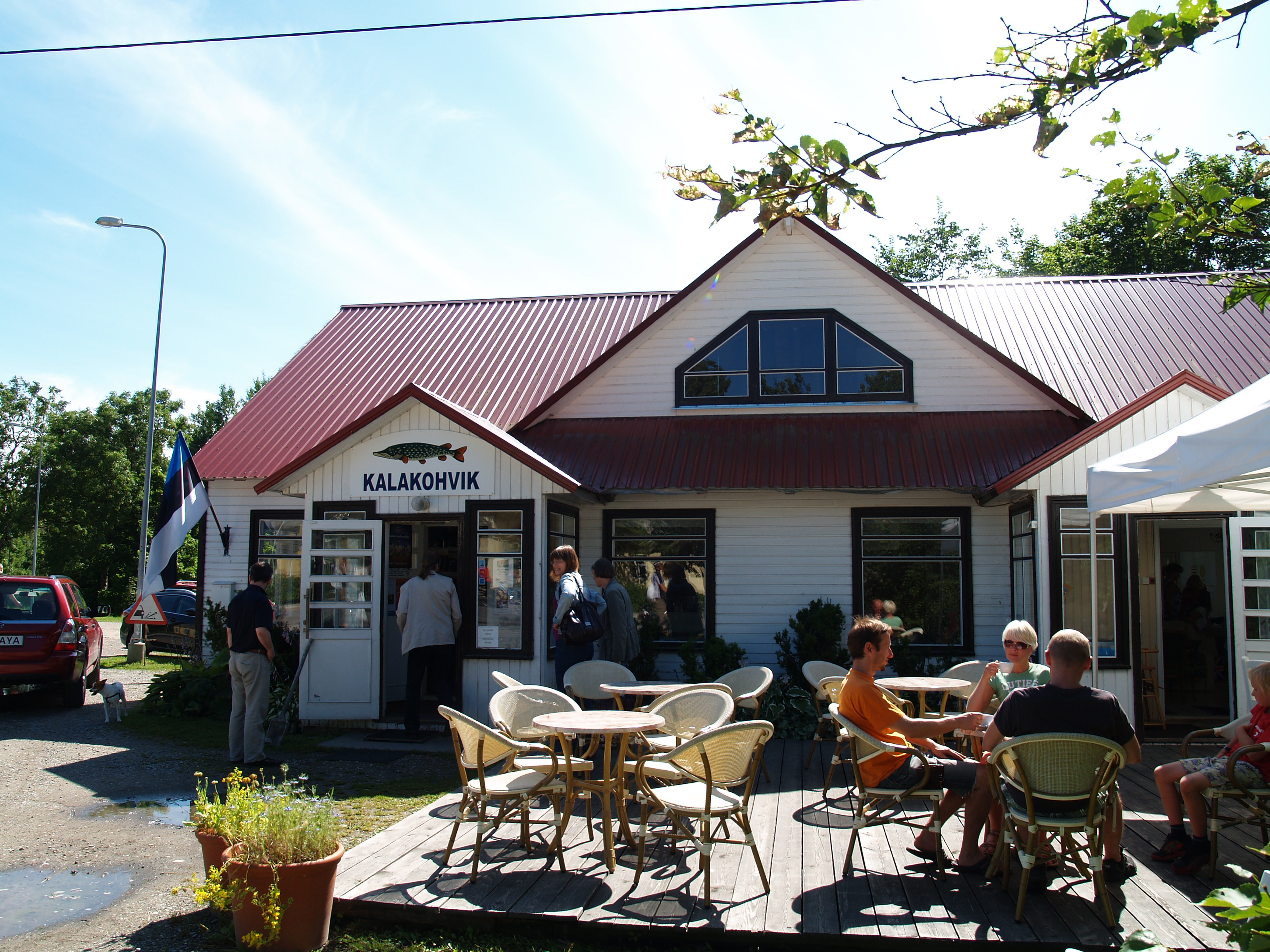 Liiva kalakohvik